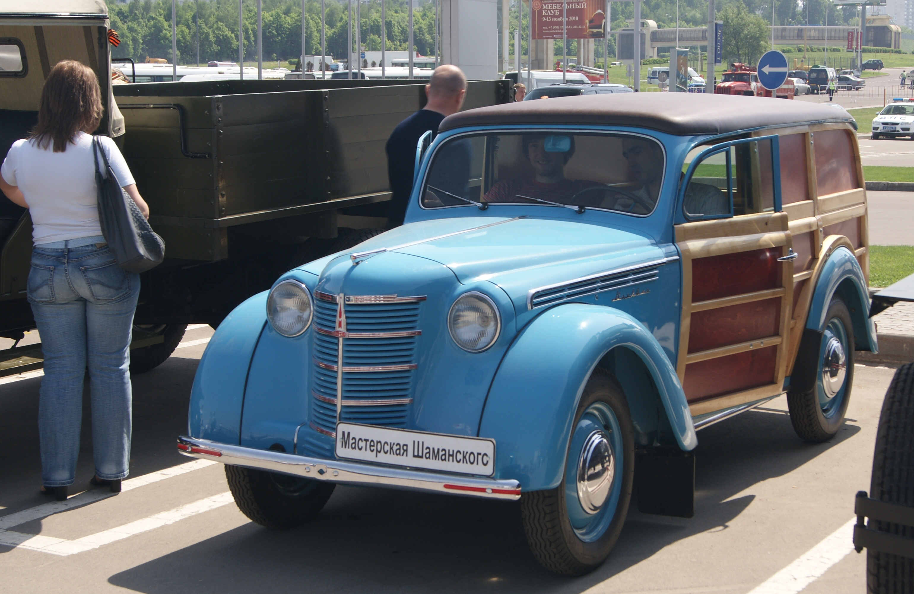 Moskvich 400-422 or 401-422.